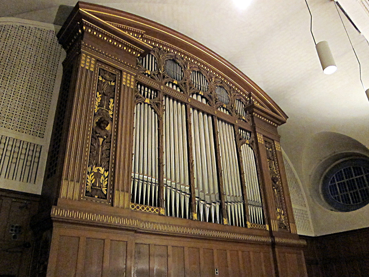 Orgel der Kreuzkirche Zürich-Hottingen